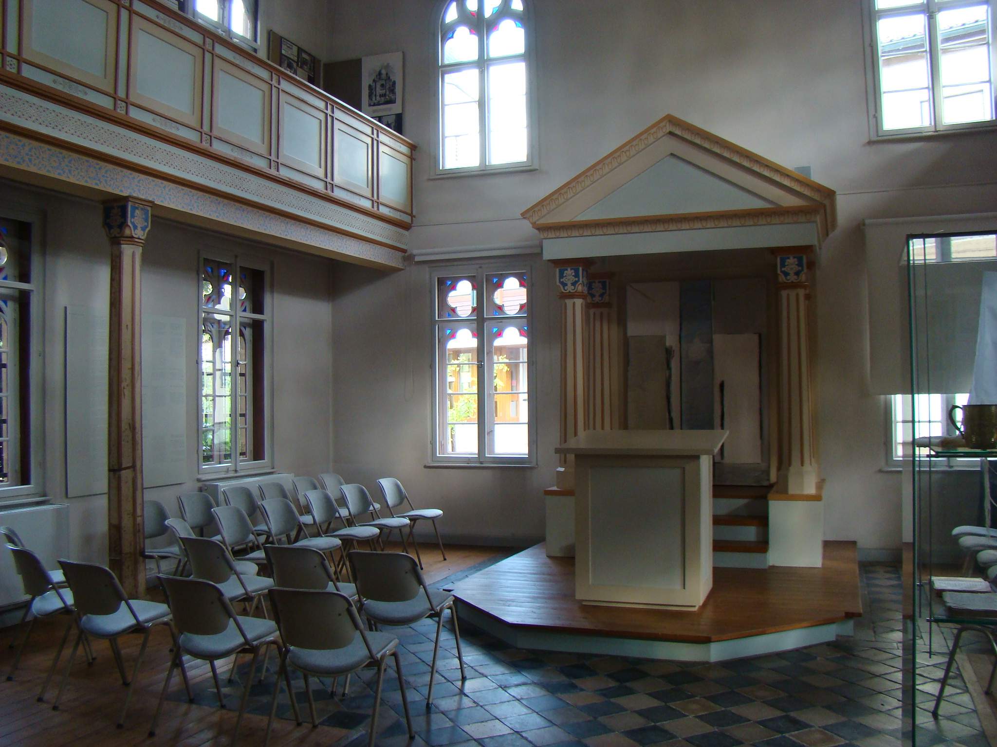 Blick in die ehem. Synagoge in Obersulm-Affaltrach